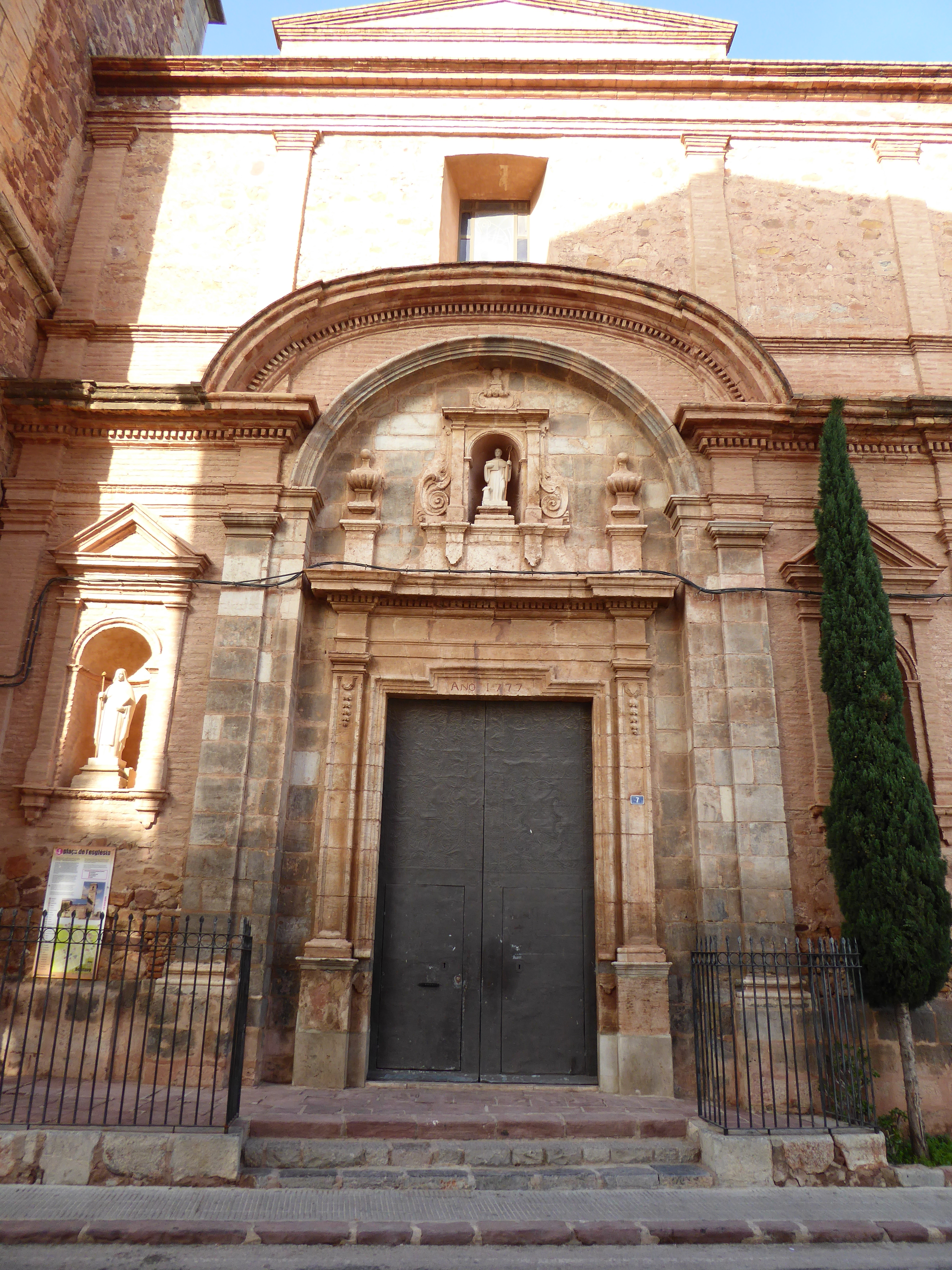 Església parroquial de Sant Gil Abat (Benifairó de les Valls) 12.058-001.